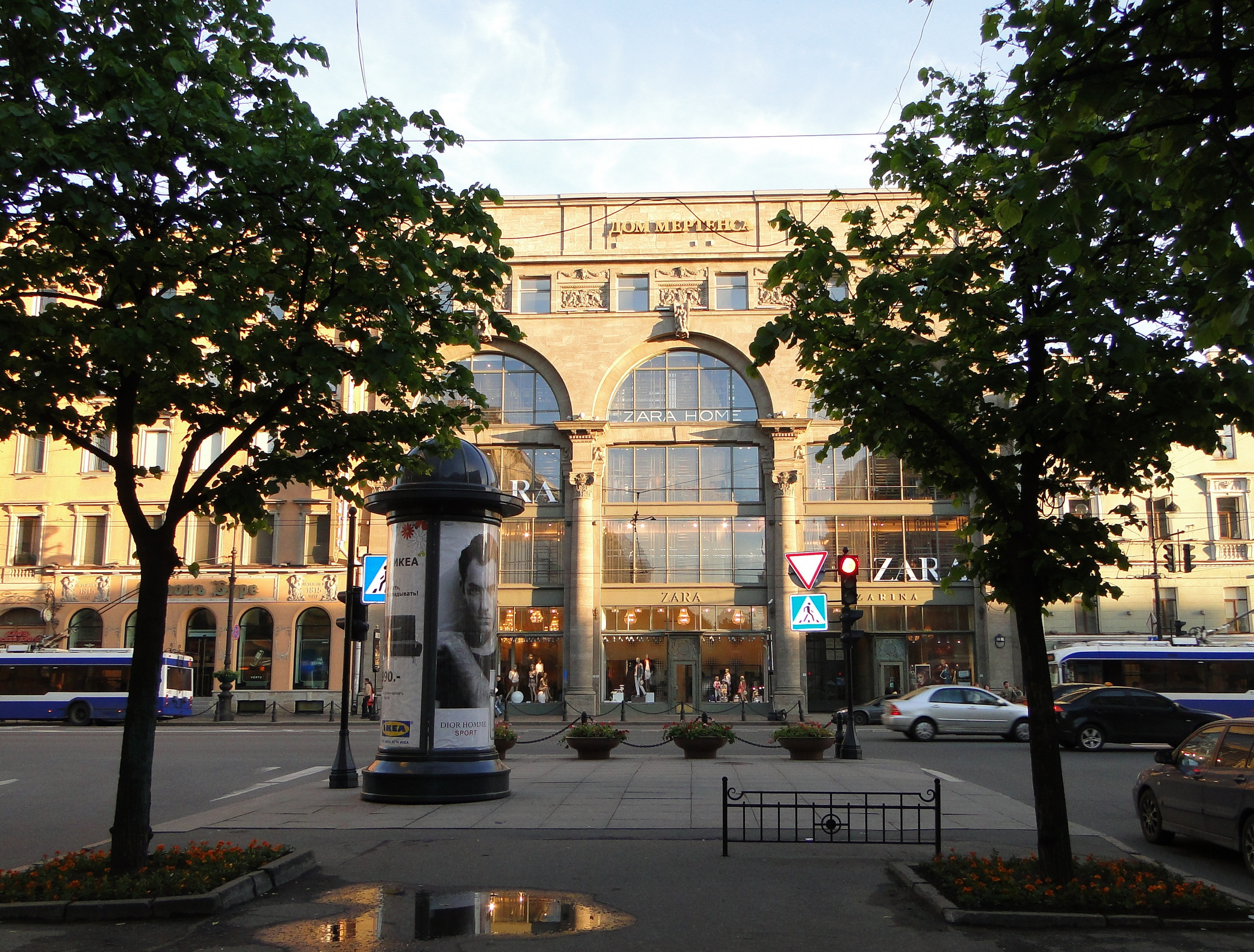 Вид с Большой Конюшенной ул. на Невский проспект.